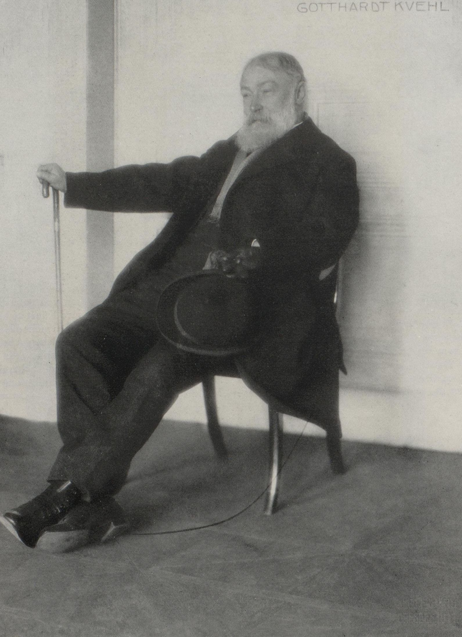 Gotthardt Kuehl, fotografiert von Hugo Erfurth (1874-1948)